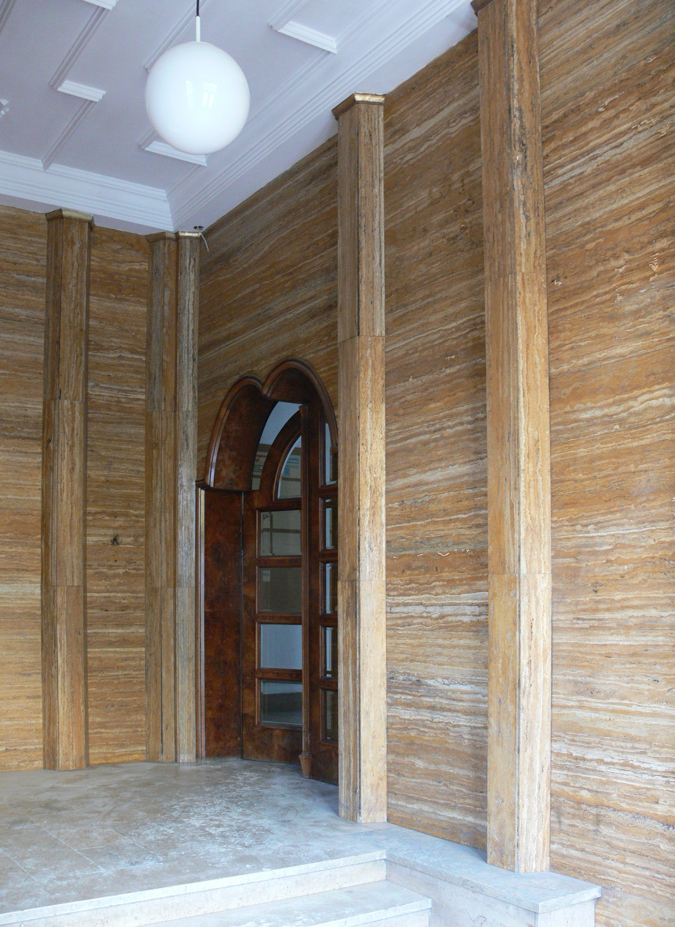 Cammann-Hochhaus (Chemnitz-Furth)